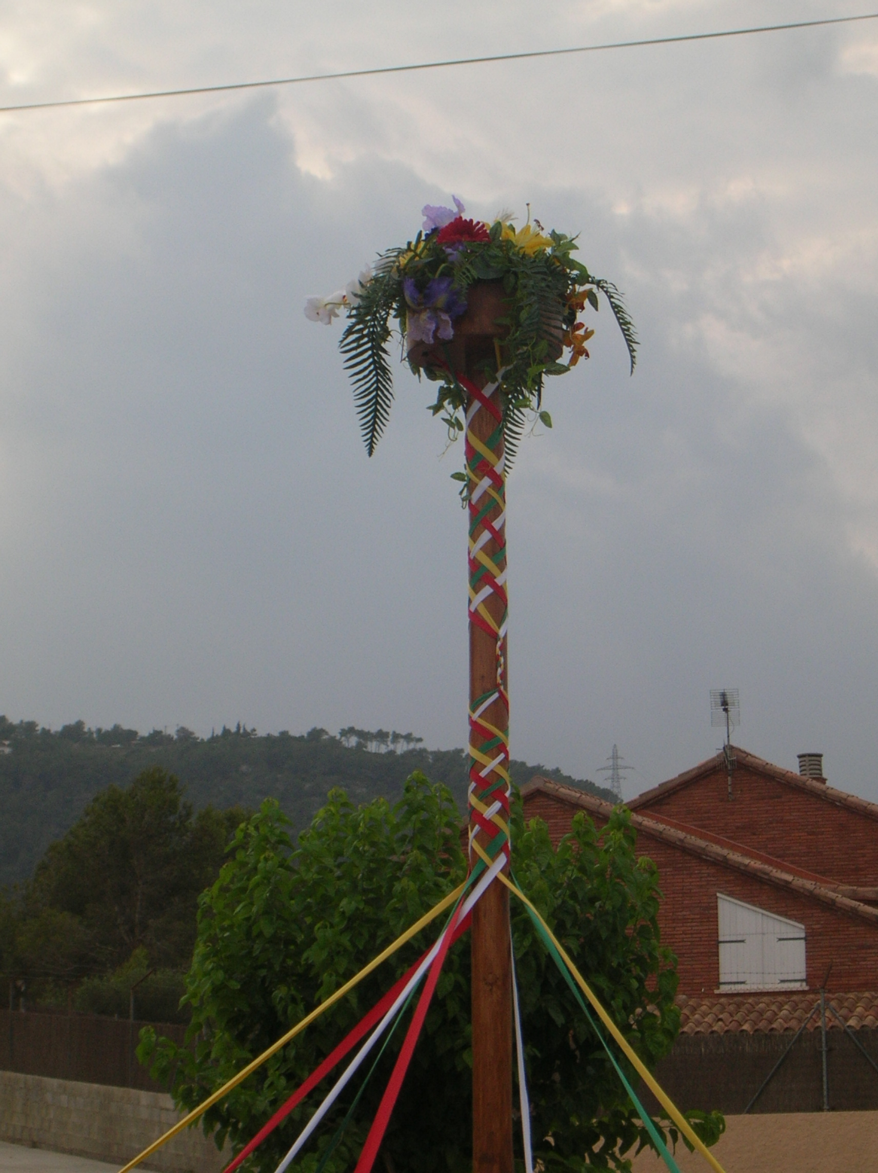 pal del Ball de les gitanes de Vilafranca en un ball a Canyelles el juliol del 2007